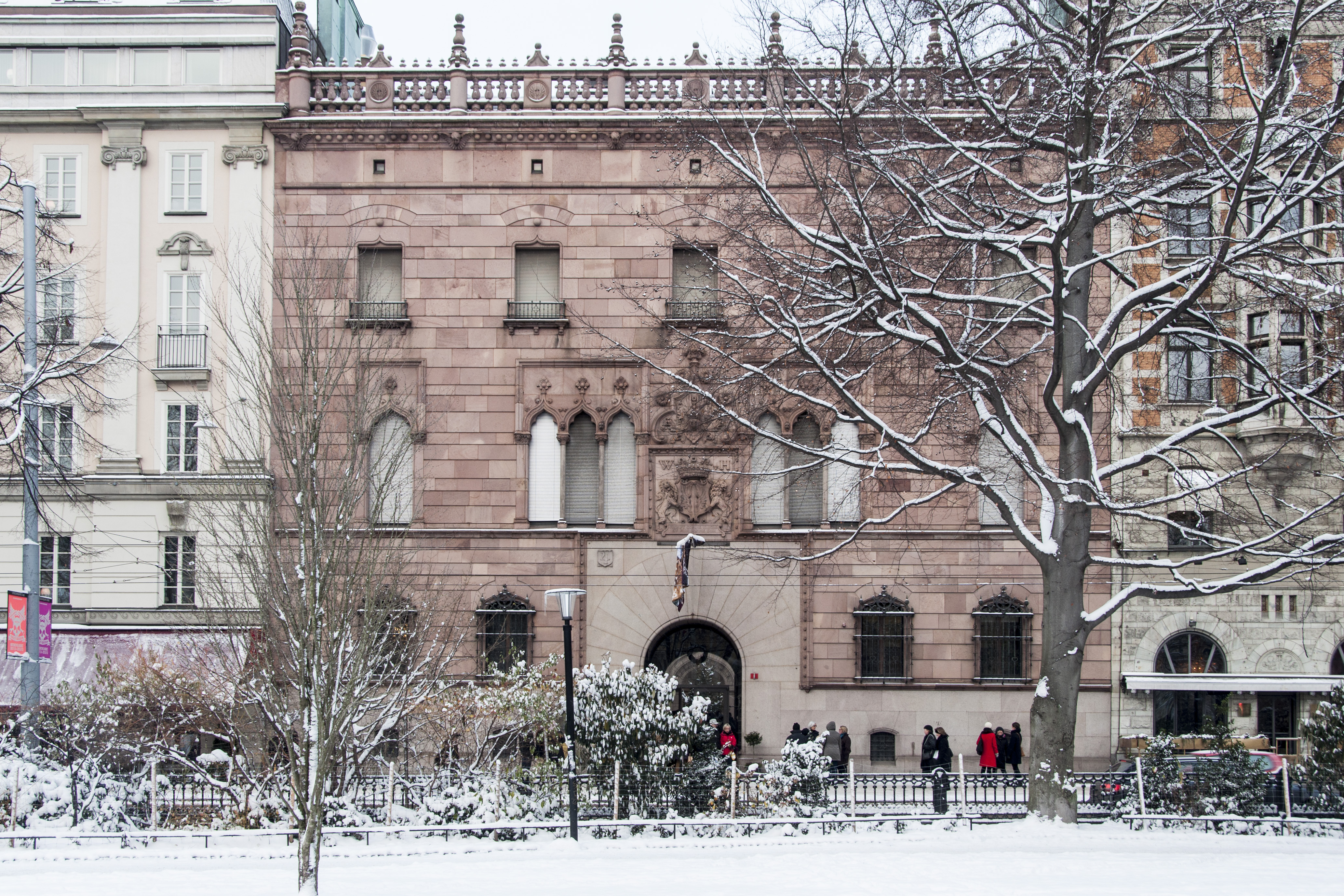 Hallwylska palatset, Nybyggnadsår 1893 - 1898, C. Widen (Byggmästare) Isak Gustaf Clason (Arkitekt) W. von Hallwyl (Byggherre)